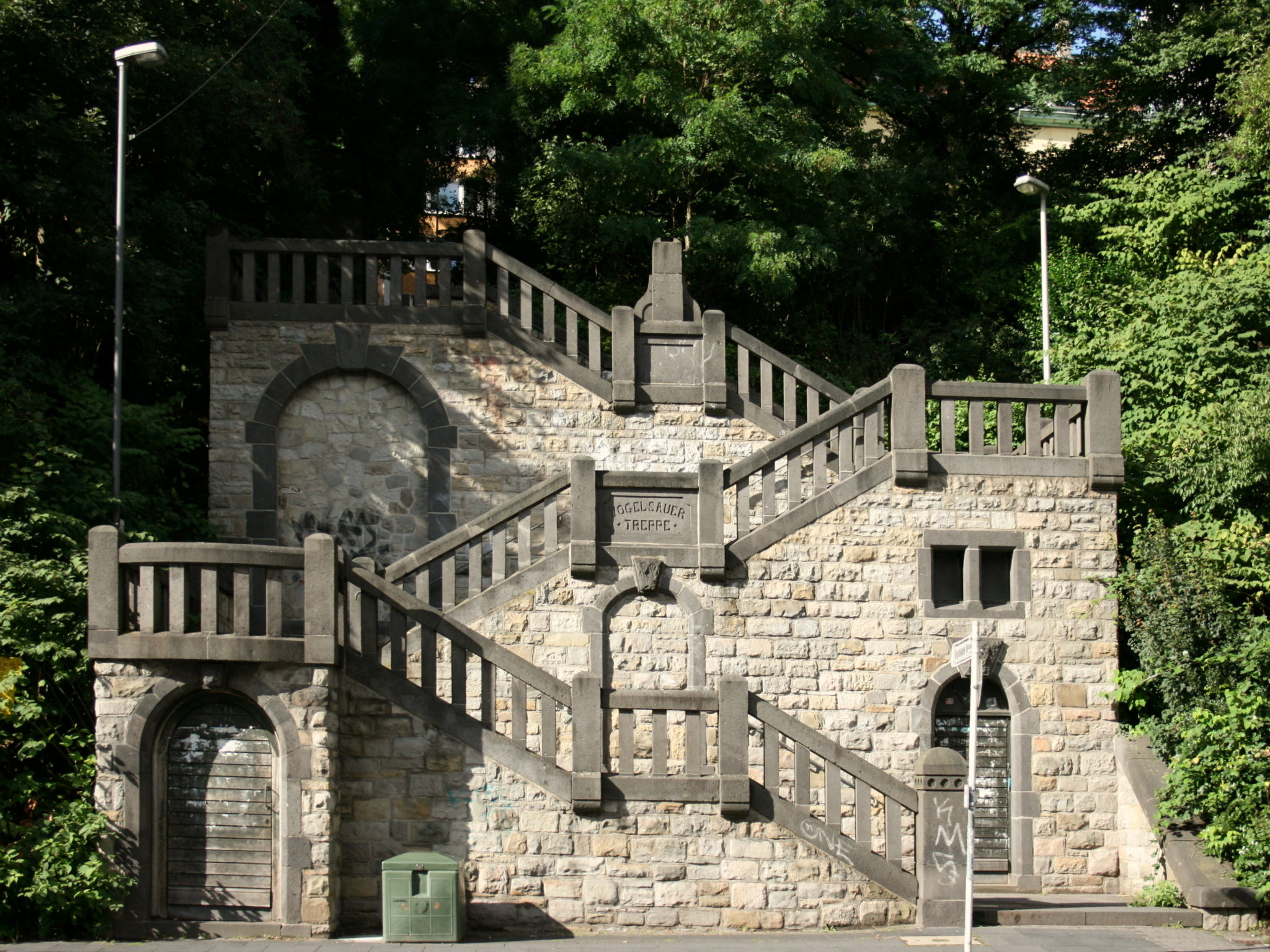 Untere Vogelsauer Treppe in Wuppertal